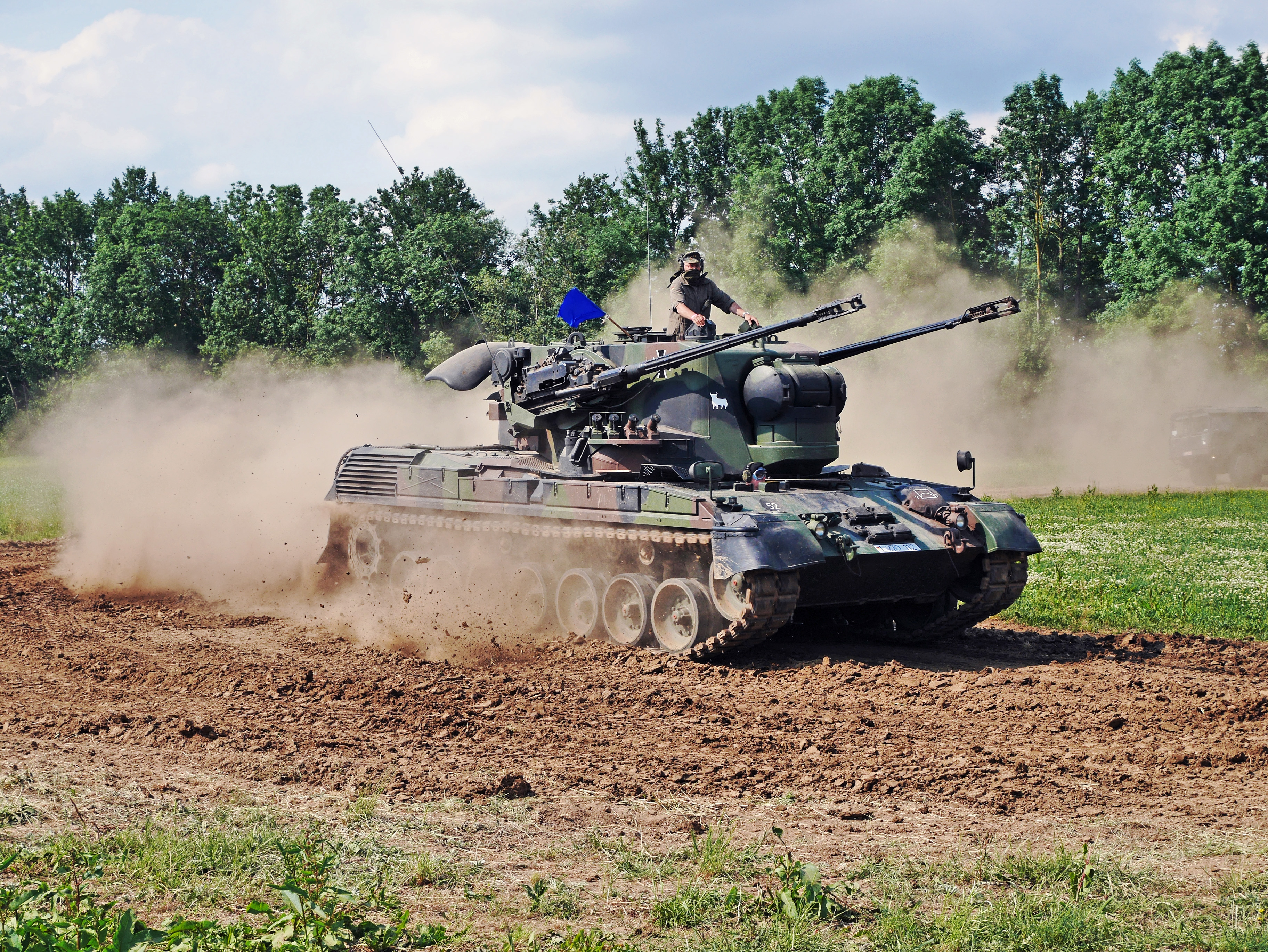 Ein Flugabwehrkanonenpanzer Gepard in Fahrt beim Militärtag 2015 in Uffenheim. Der Gepard ist ein autonomer, allwetterkampffähiger FlaK-Panzer aus deutscher Produktion. Entwickelt und produziert wurde er in den 1970er Jahren. Die Außerdienststellung fand von Ende der 1990er beziehungsweise Anfang der 2000er-Jahre statt.